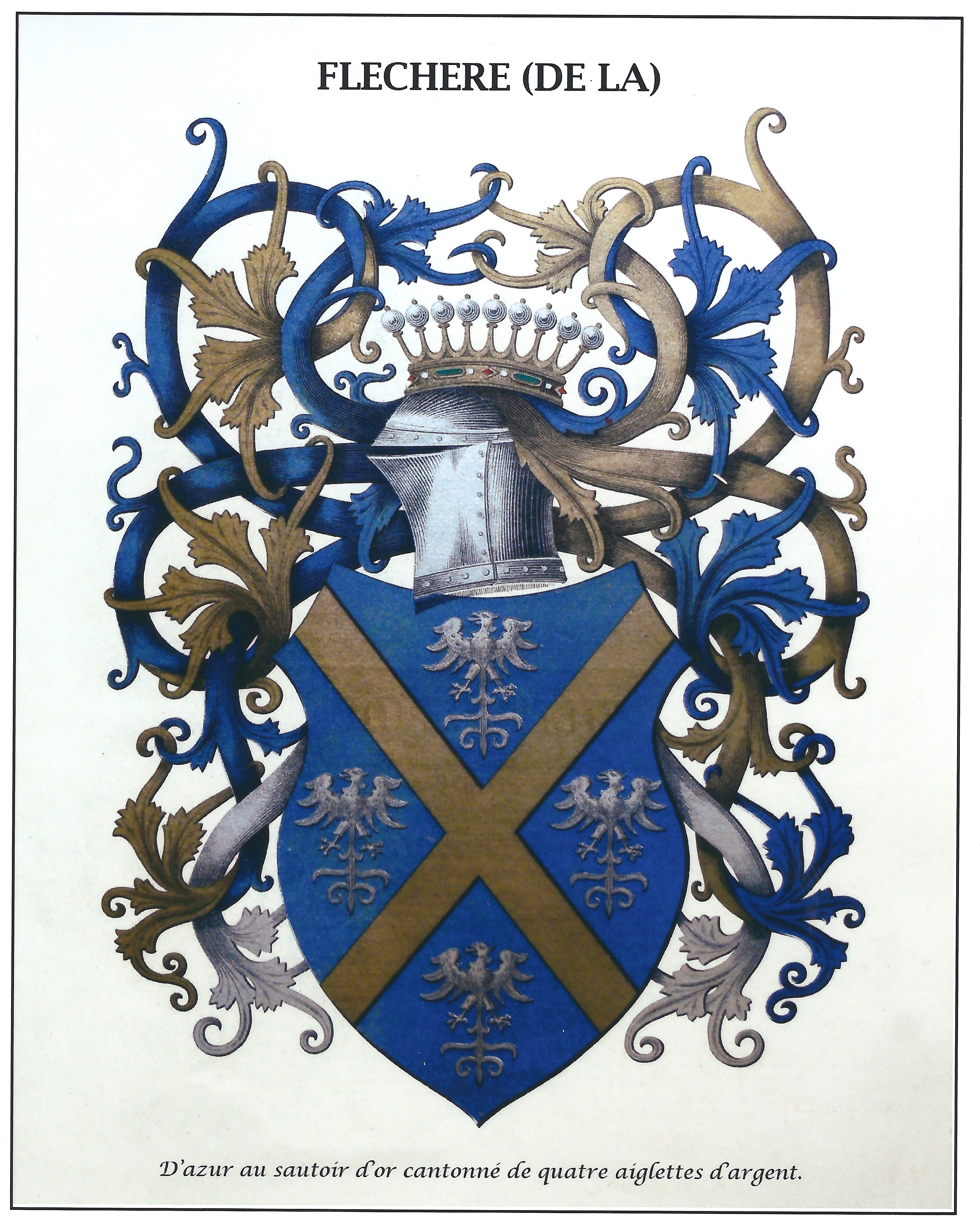 Armoiries de la famille De la Fléchère: D'azur au sautoir d'or cantonné de quatre aiglettes d'argent.